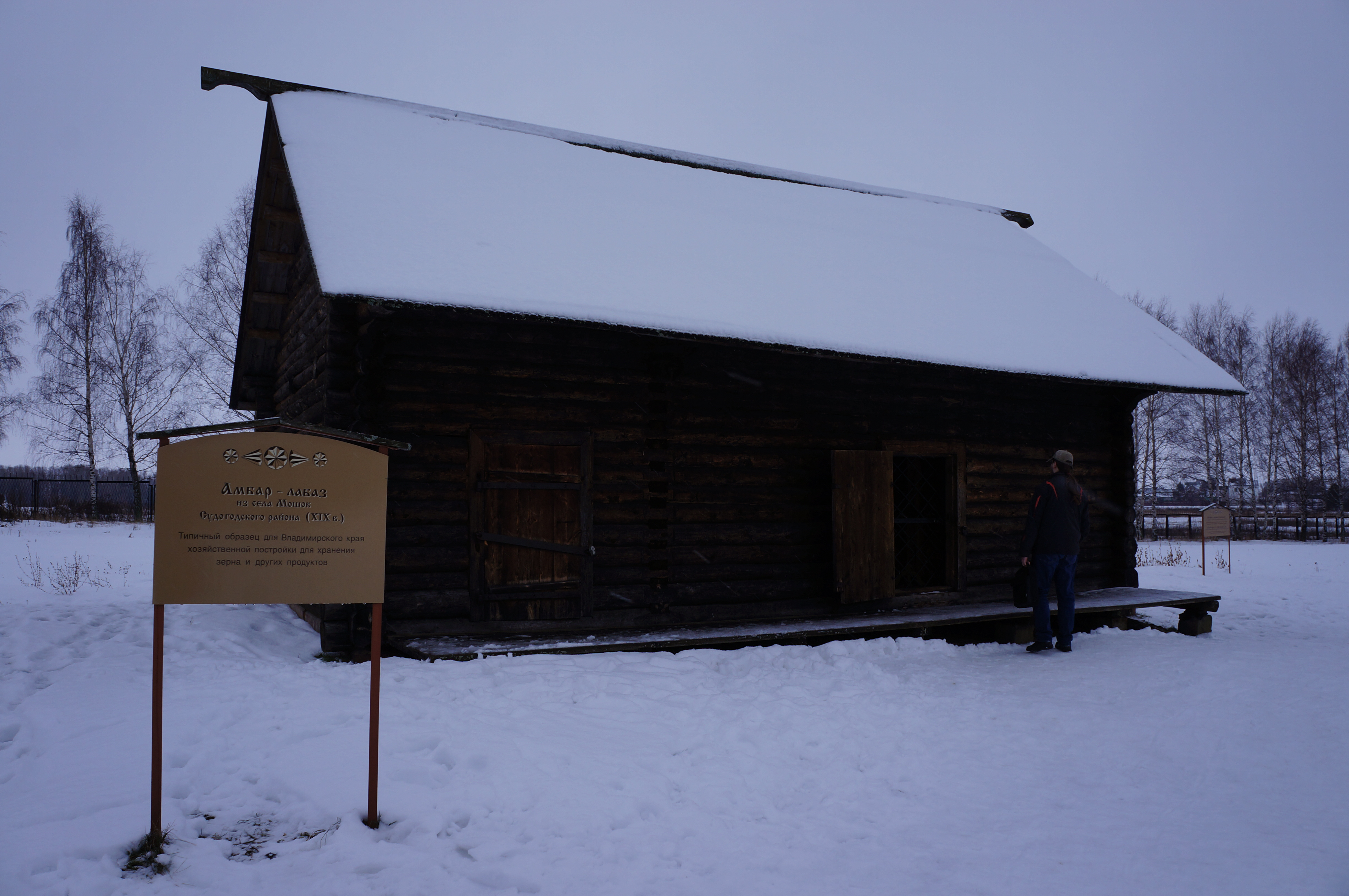 Суздаль. Деревянное зодчество - Амбар Лабаз из села Мошок XIX в.